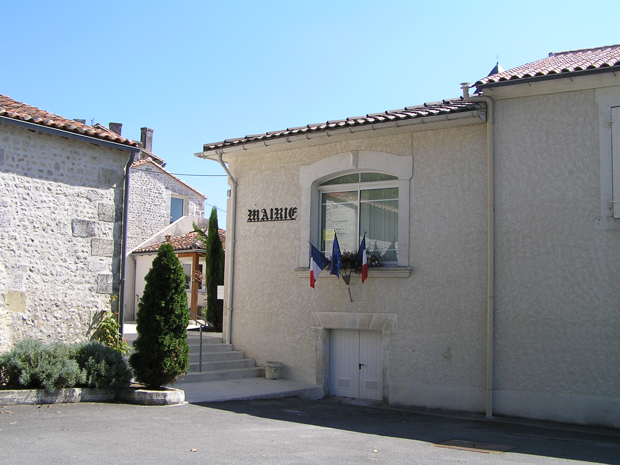 mairie de Mainsfonds